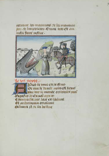 Christine de Pisan, Epître d'Othéa Fondation Martin Bodmer, Cologny Cod. Bodmer 49